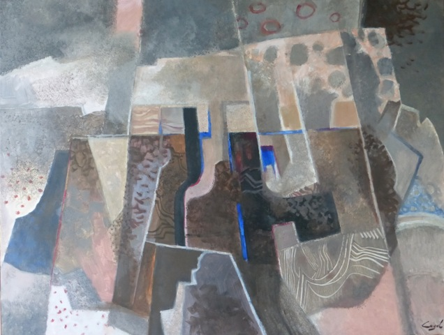 Collines, acrylique et sable sur toile